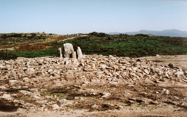 Dolmen 2 at Outeiro de Gregos, Baião, Portugal